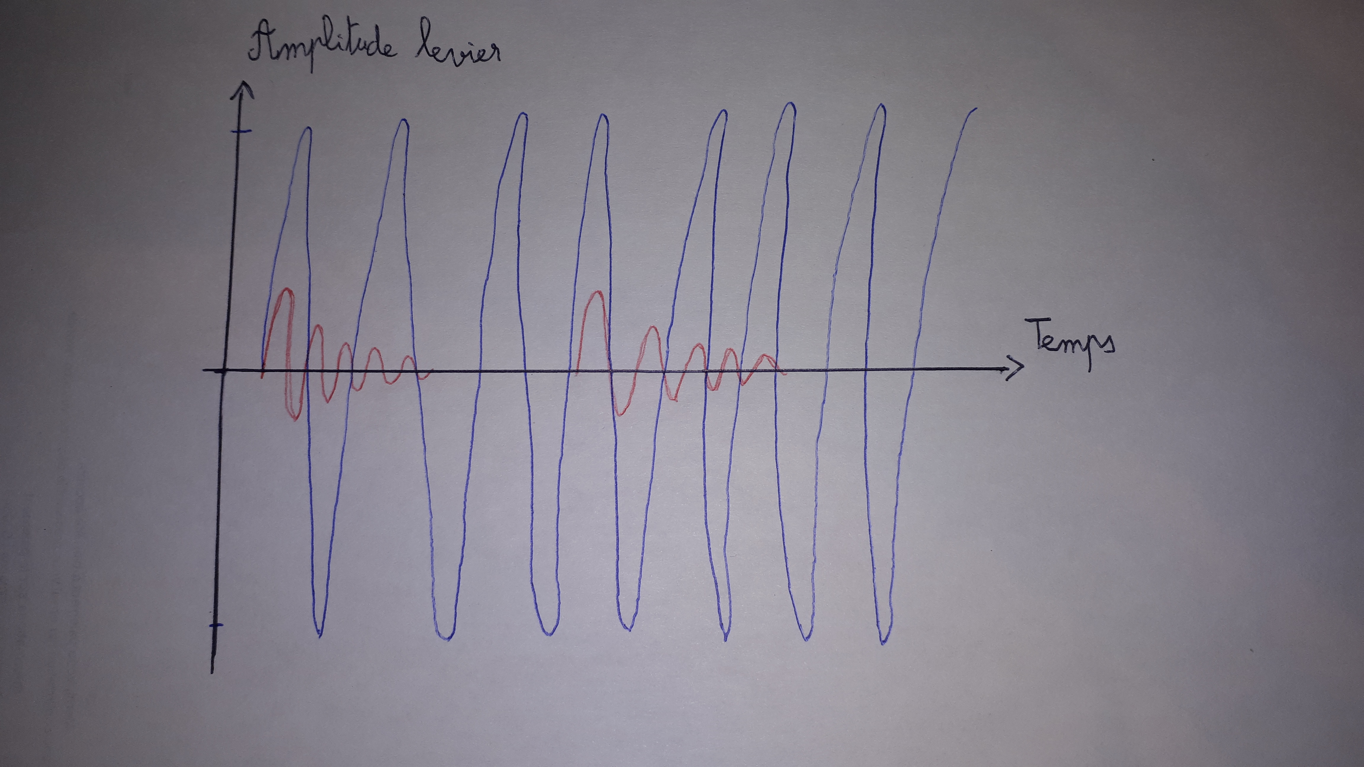 Dessin théorique du signal reçu par l'AFM-IR. Comparaison entre le mode "Contact" avec résonance (en bleu) et sans résonance (en rouge). UNe image provenant d'un AFM-IR est bienvenue.